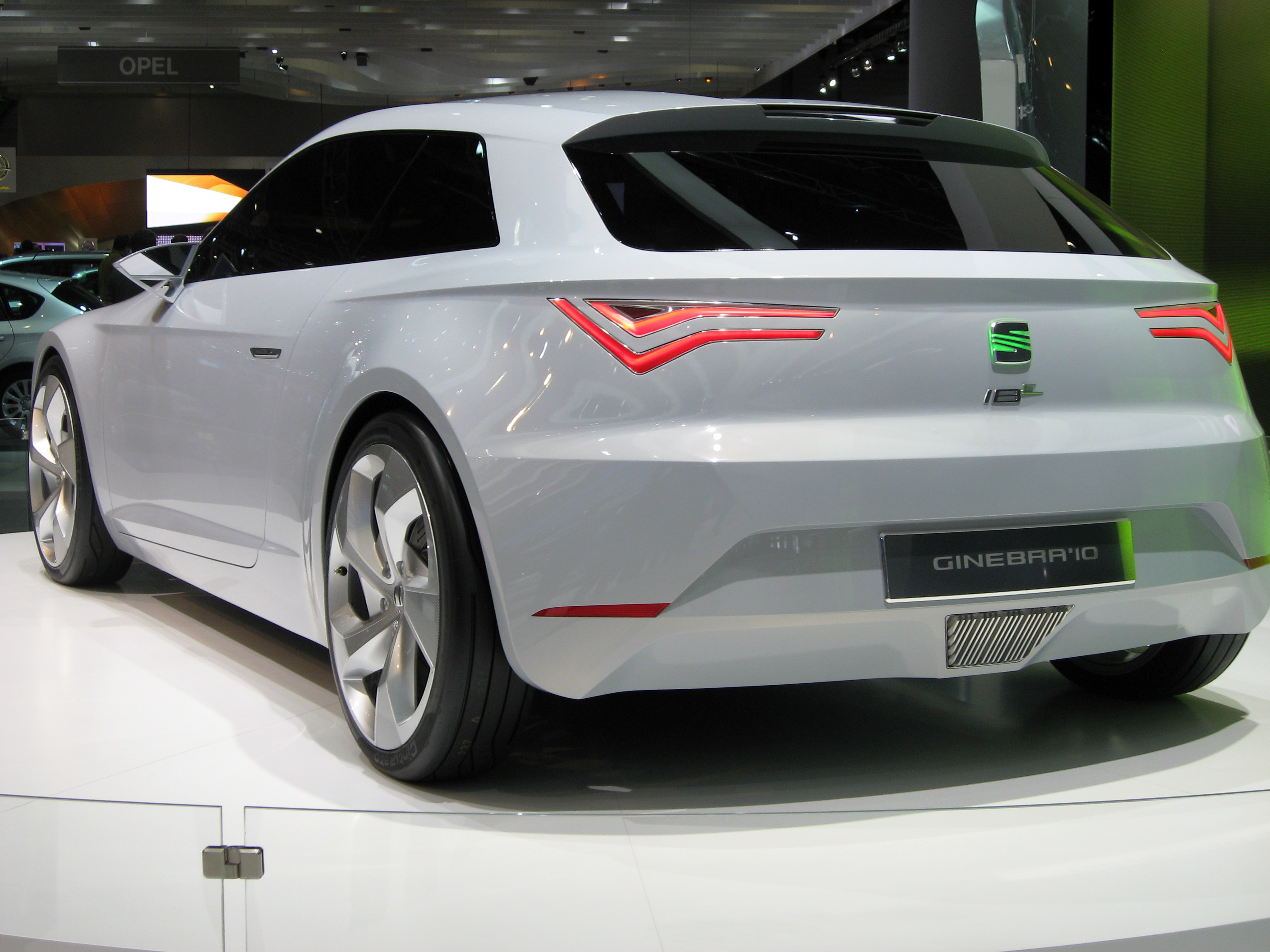 Seat IBE au Motorshow Geneva 2010